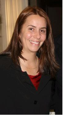 A nadadora brasileira Patrícia Amorim